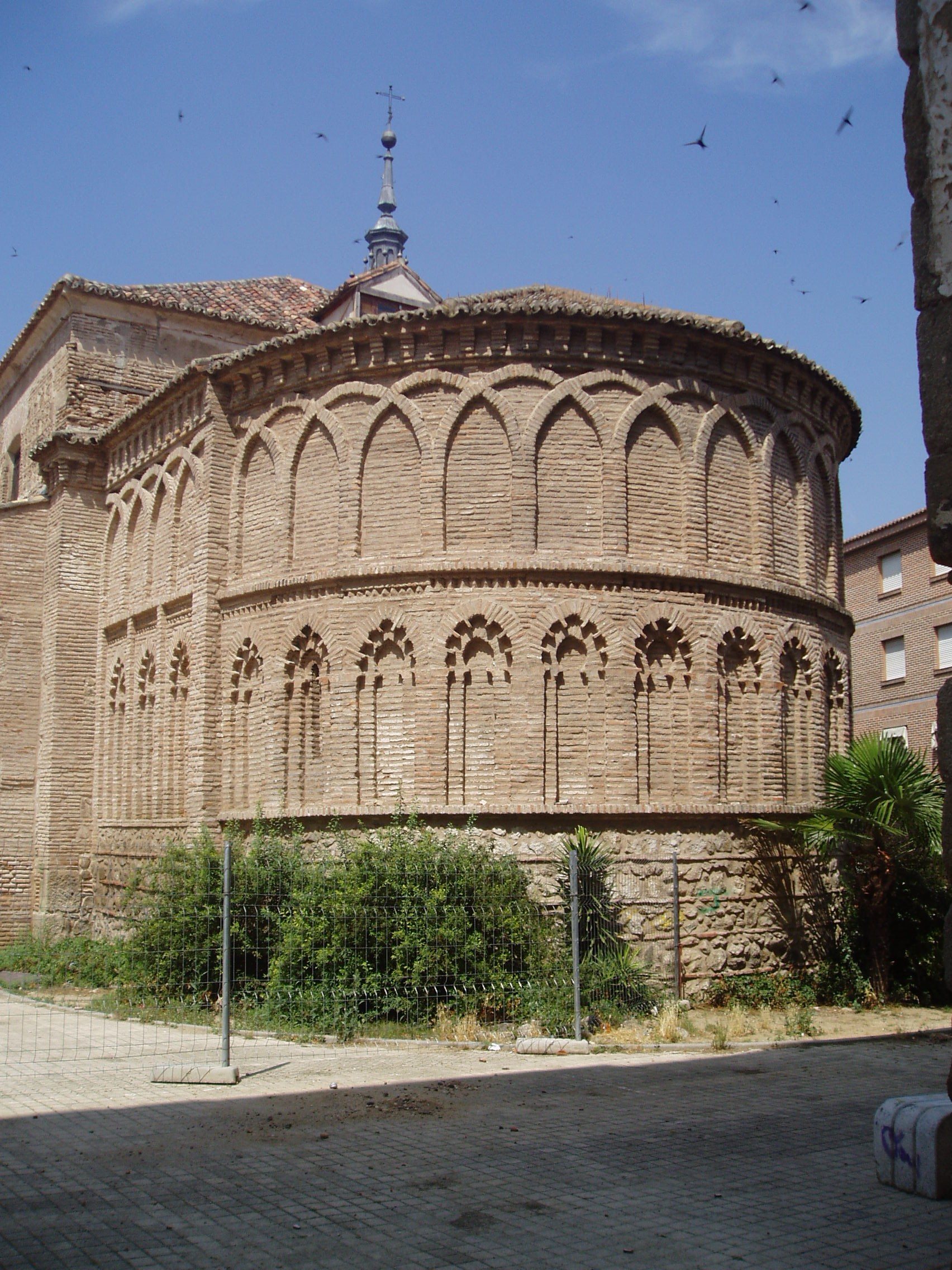 Abside Mozarabe en la Iglesia del Salvador en Talavera de la Reina (Spain)